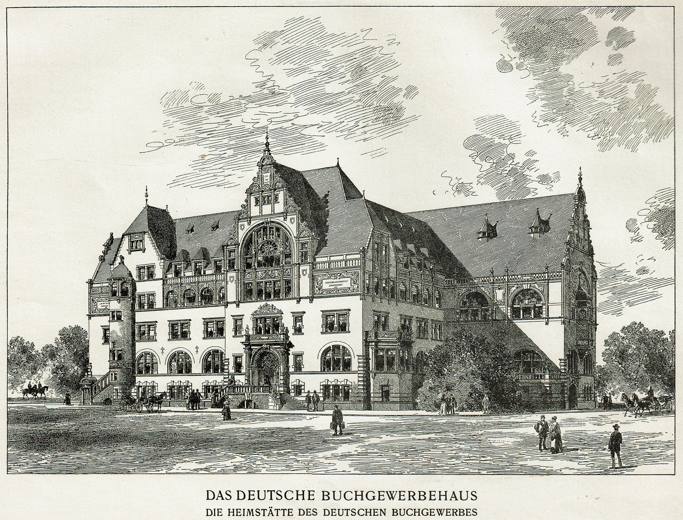 Buchgewerbehaus 1909, aus: Archiv für Buchgewerbe. [Festnummer anlässlich des 25jährigen Bestehens des Deutschen Buchgewerbevereins] 46 (1909), Heft 10.